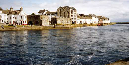 Corribmündung